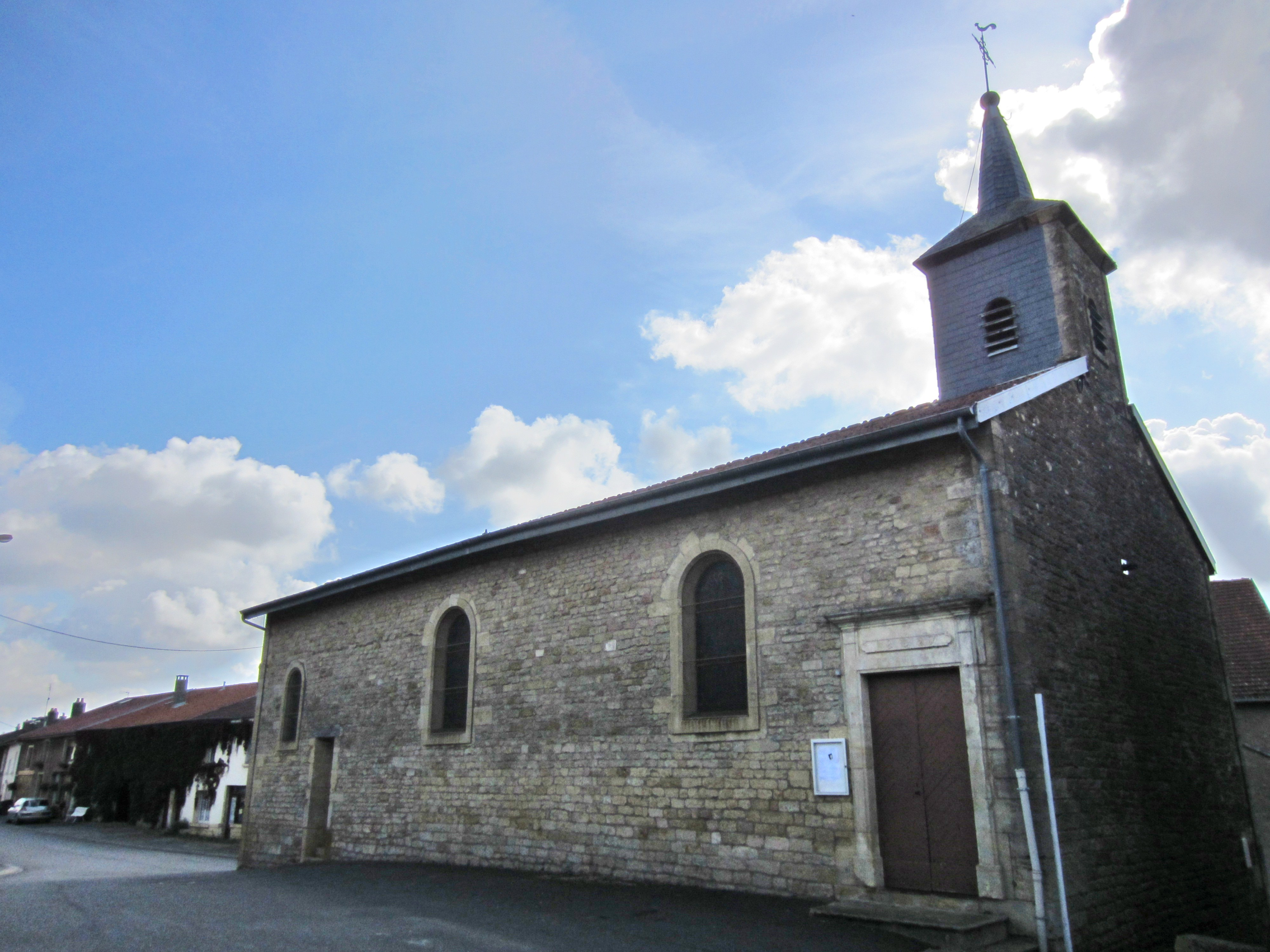 Description eglise Boismont 54 eglise Boismont 54